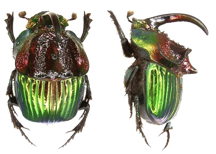 Familie: Scarabaeidae Groesse: 15-20 mm Fundort: Mexiko, Vera Cruz, 1983 det. U.Schmidt, 2006 Photo: U.Schmidt, 2006